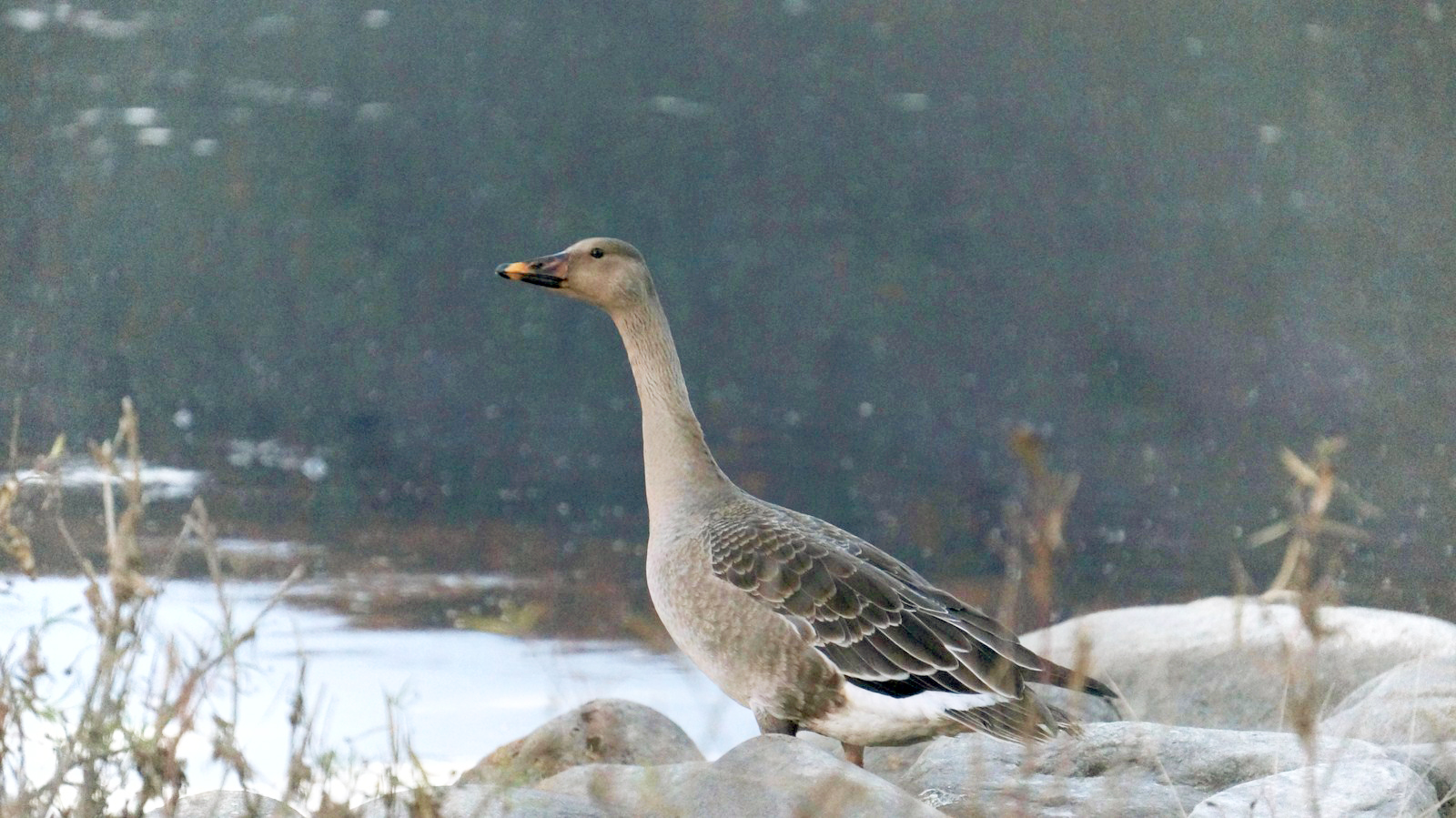 Осенний снимок гуся гуменника Саха тыла: Хоҥор хаас. Өлүөхүмэ, күһүн, 2013